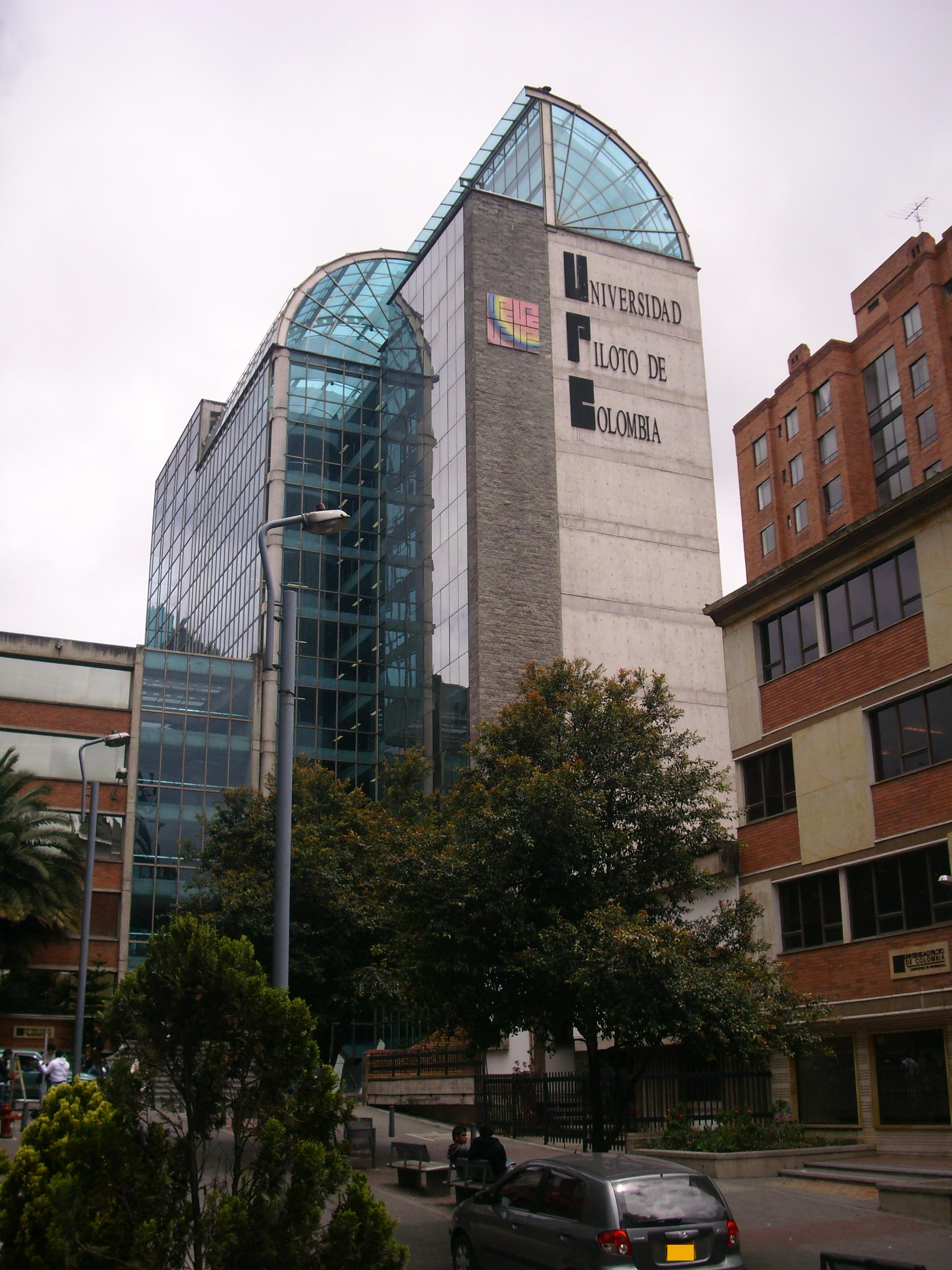 este edificio corresponde a una de las sedes principales de la universidad piloto de colombia